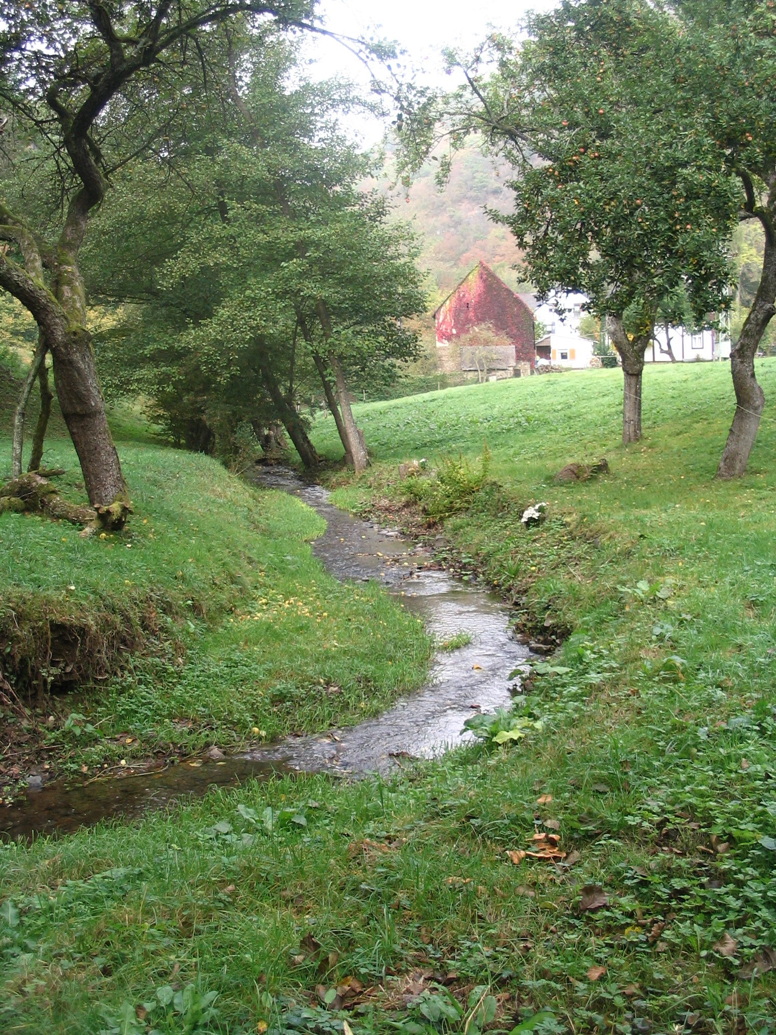 Lützbach bei Lütz